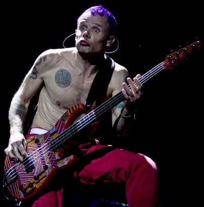 Flea en concert à Bogotá (Colombie) le 11 septembre 2011.